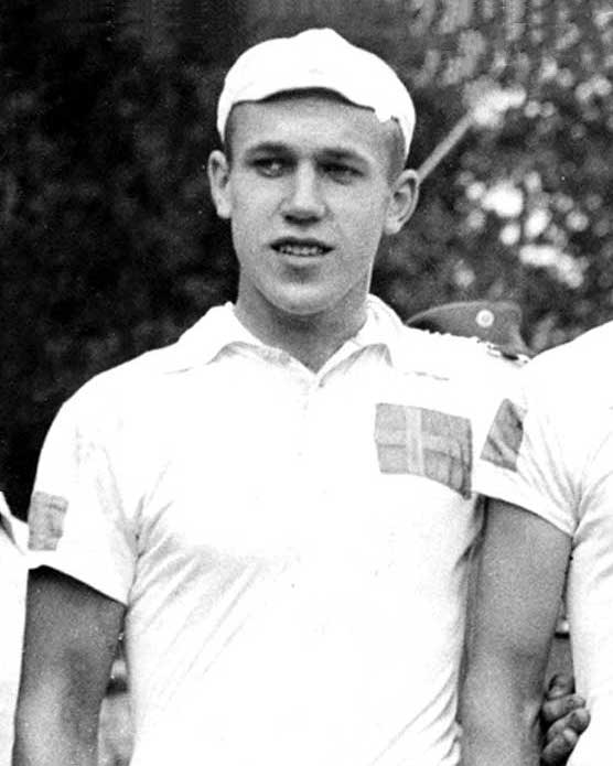 Åke Seyffarth